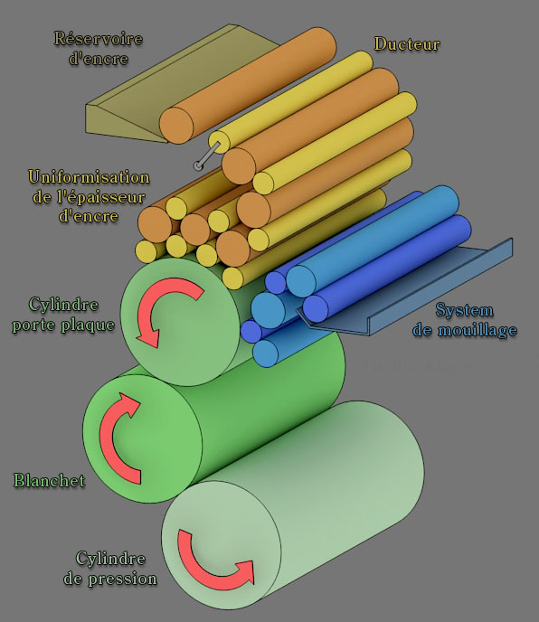 schema représentative du fonctionnement d'une press offset